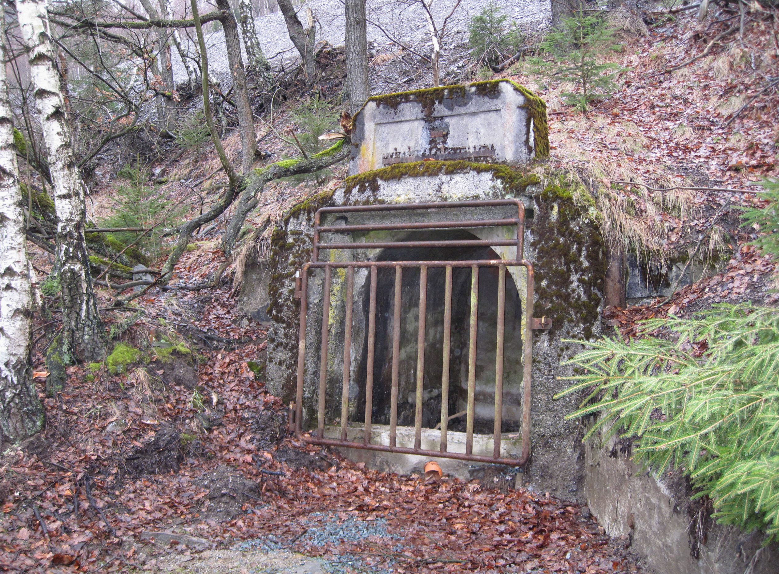 Dörnberg in Bestwig-Ramsbeck, Hochsauerlandkreis. Teilstrecke 4 Punkt 17 (Stollen IV) des Bergbau-Wanderweges Ramsbeck.